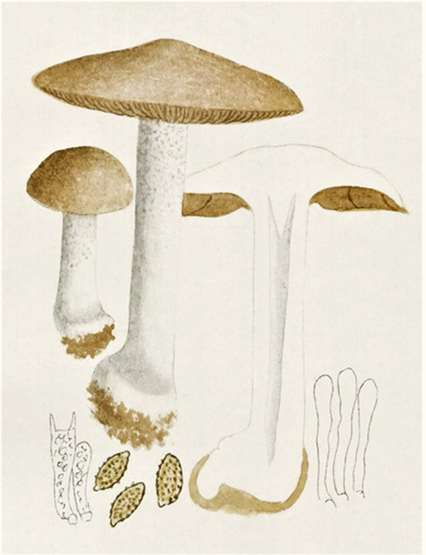 Bres.: Hebeloma ccrustuliniforme (Bull., 1787) Quél. (1872)